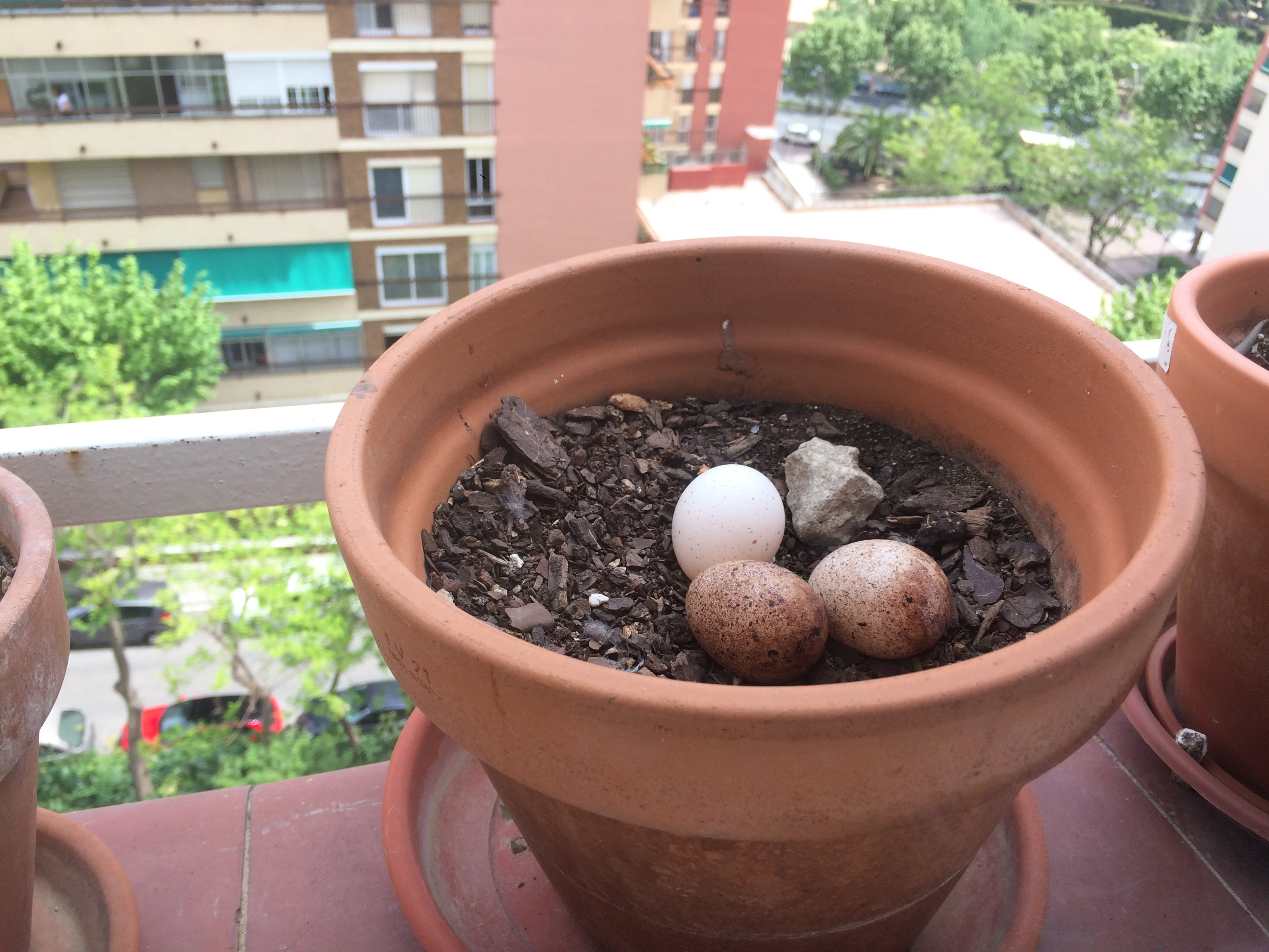 Ous de xoriguer comú a un test d'una finestra a L'hospitalte del llobregat